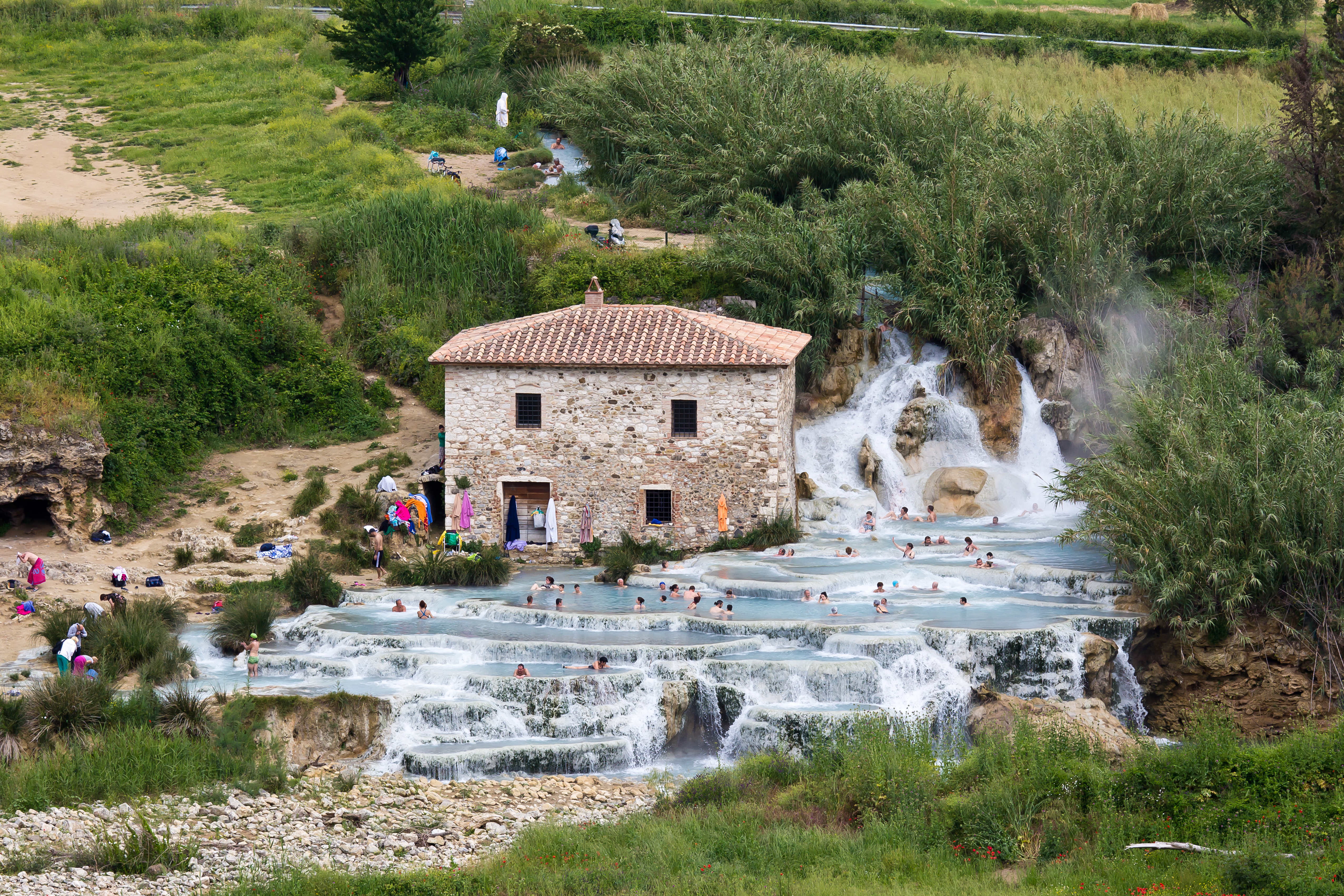 Terme di Saturnia - Cascate del Mulino